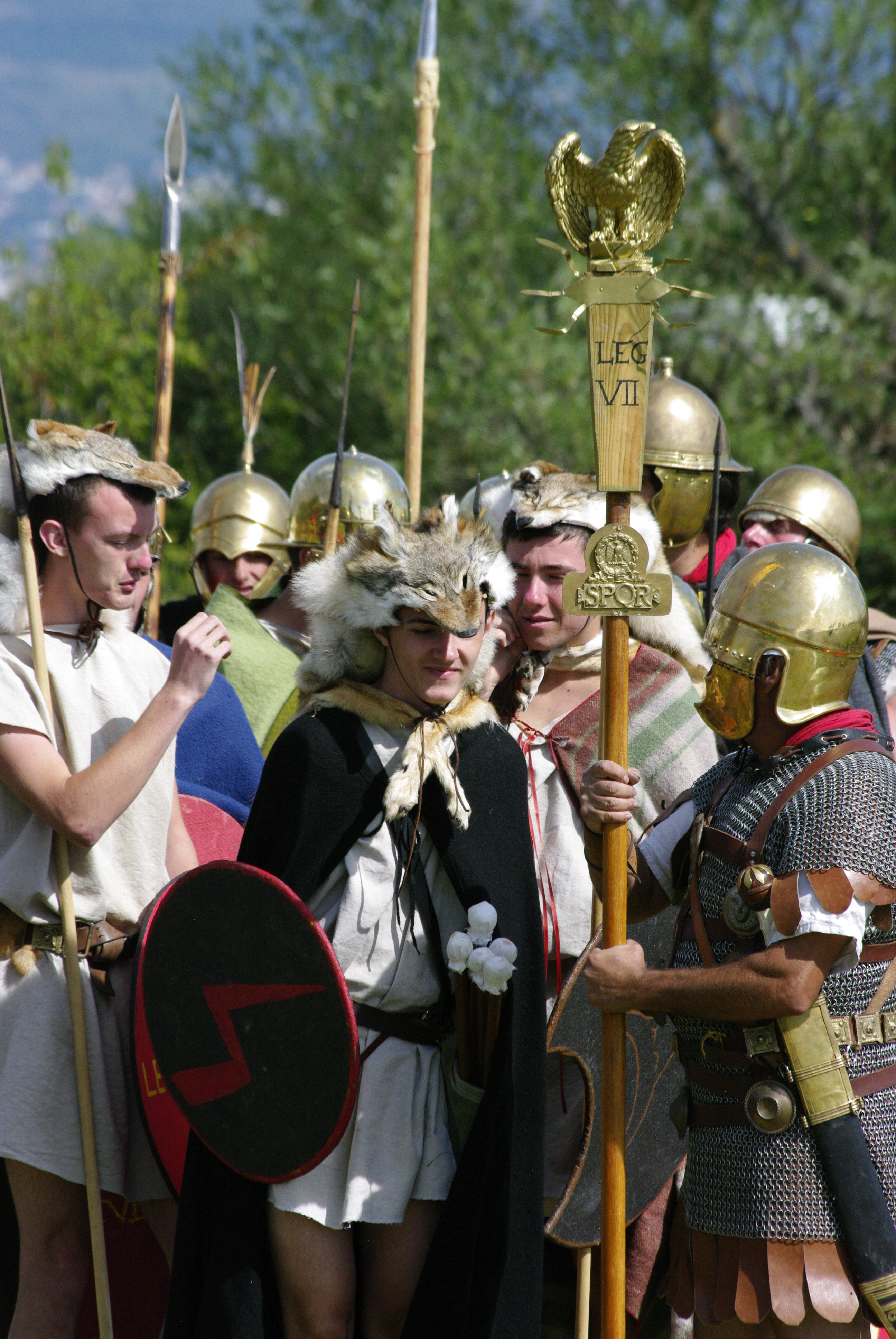 Groupe de reconstitution de l'armée romaine sous la période républicaine. On aperçoit des vélites, un aquilifer et des légionnaires dans le fond, des hastatus. Photographie réalisée le 22 juillet 2012 sur le plateau de Gergovie lors des Arverniales.